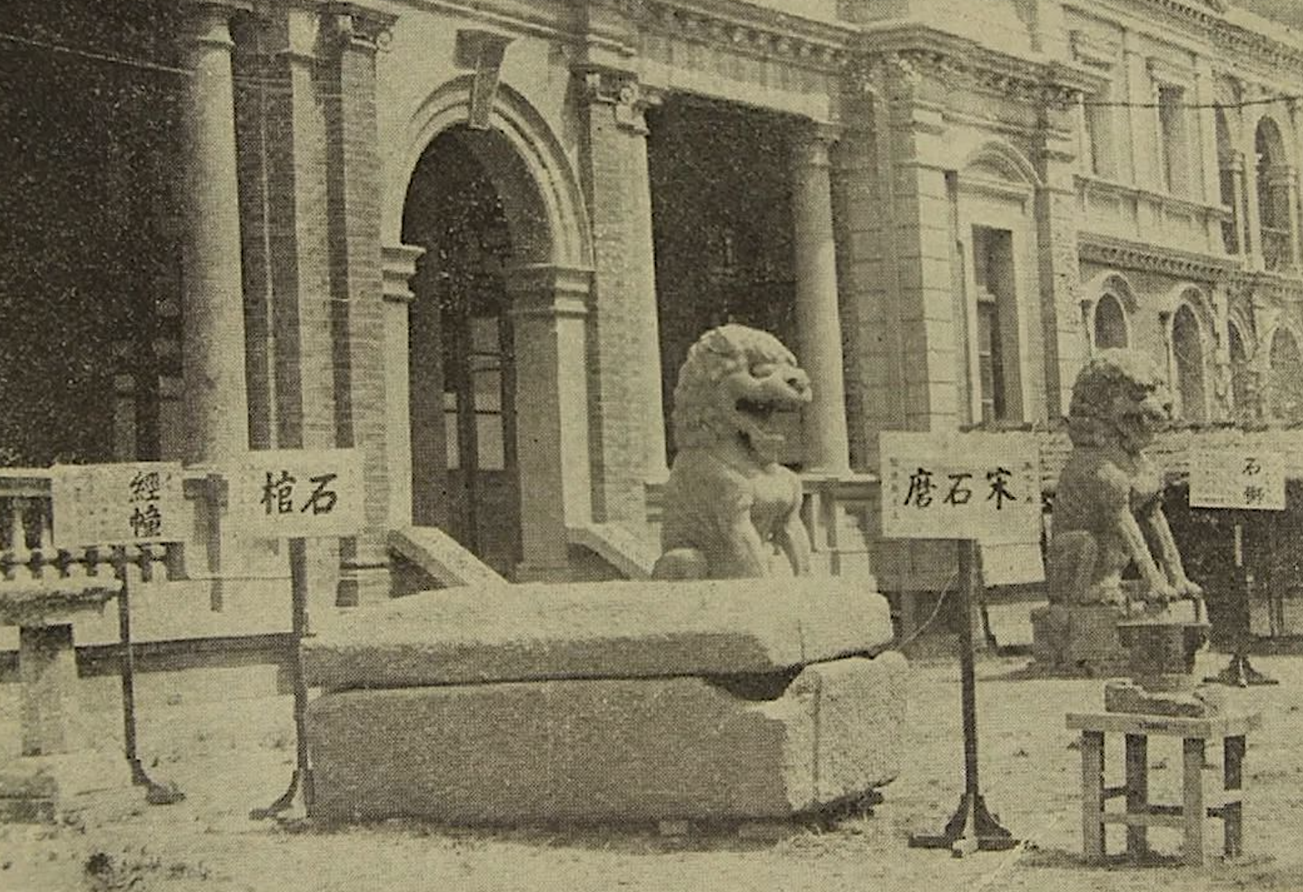 中文（中国大陆）: 1918年的天津博物馆